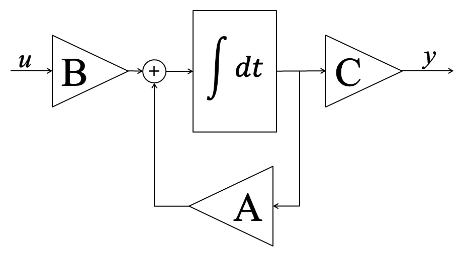 Tillståndsformen tolkad som blockschema